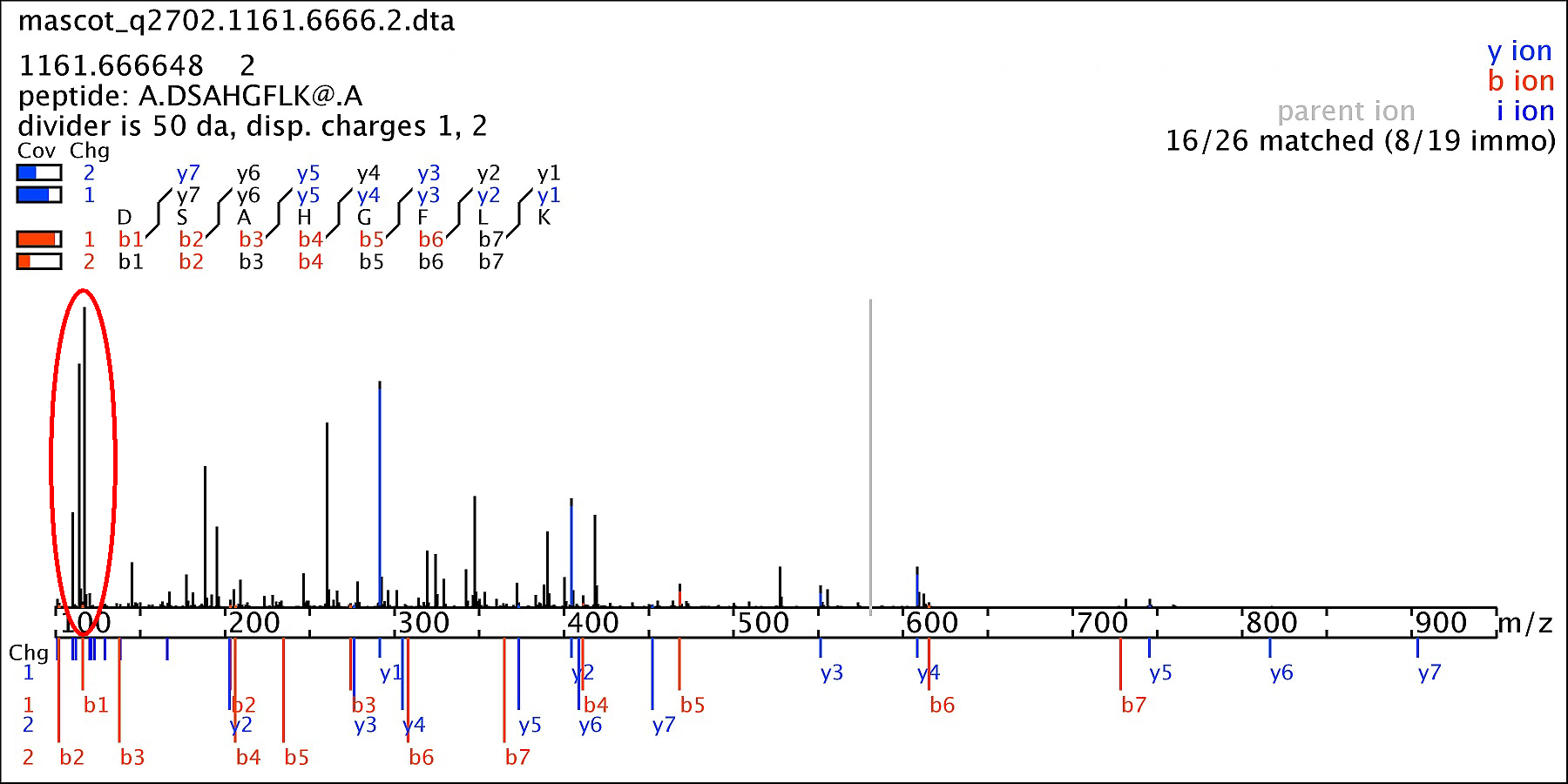 Beispiel für iTRAQ-Reporter im Massenspektrum im unteren Bereich (rot eingekreist)